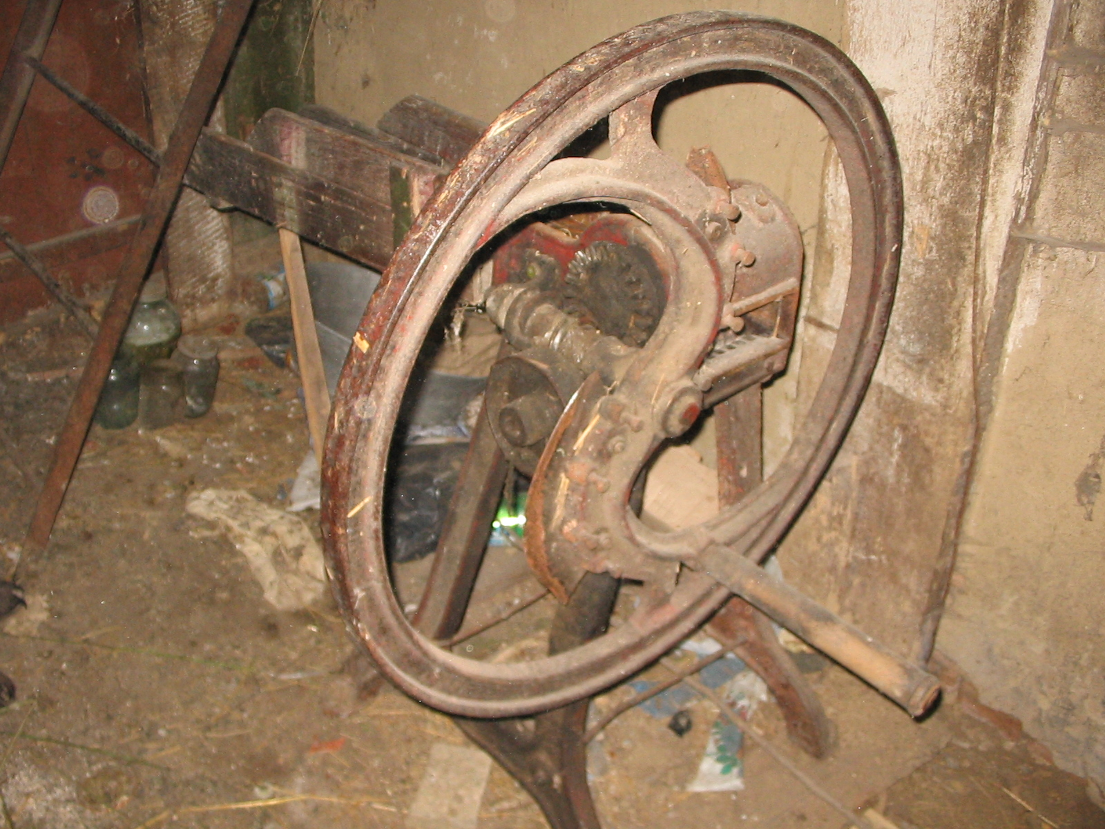 січкарня. механічне знаряддя для ручного подрібнення рослинних кормів при відгодівлі свійських тварин та птиці